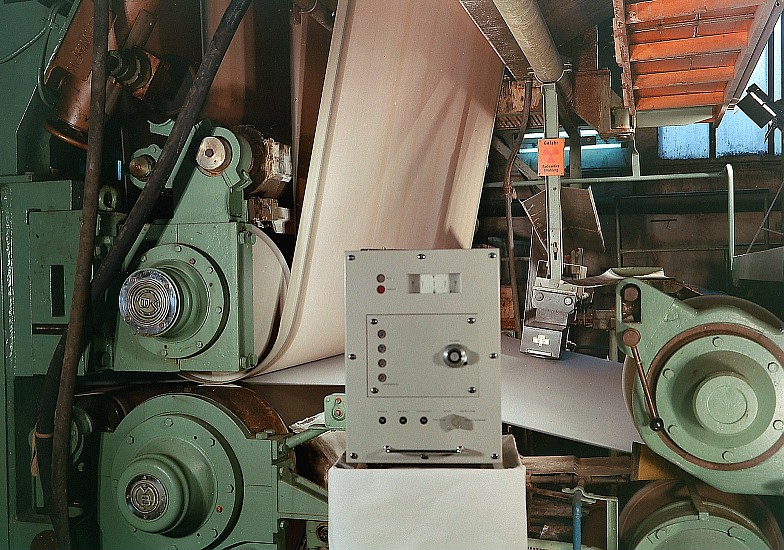 Original image description from the Deutsche Fotothek Papierfabrik